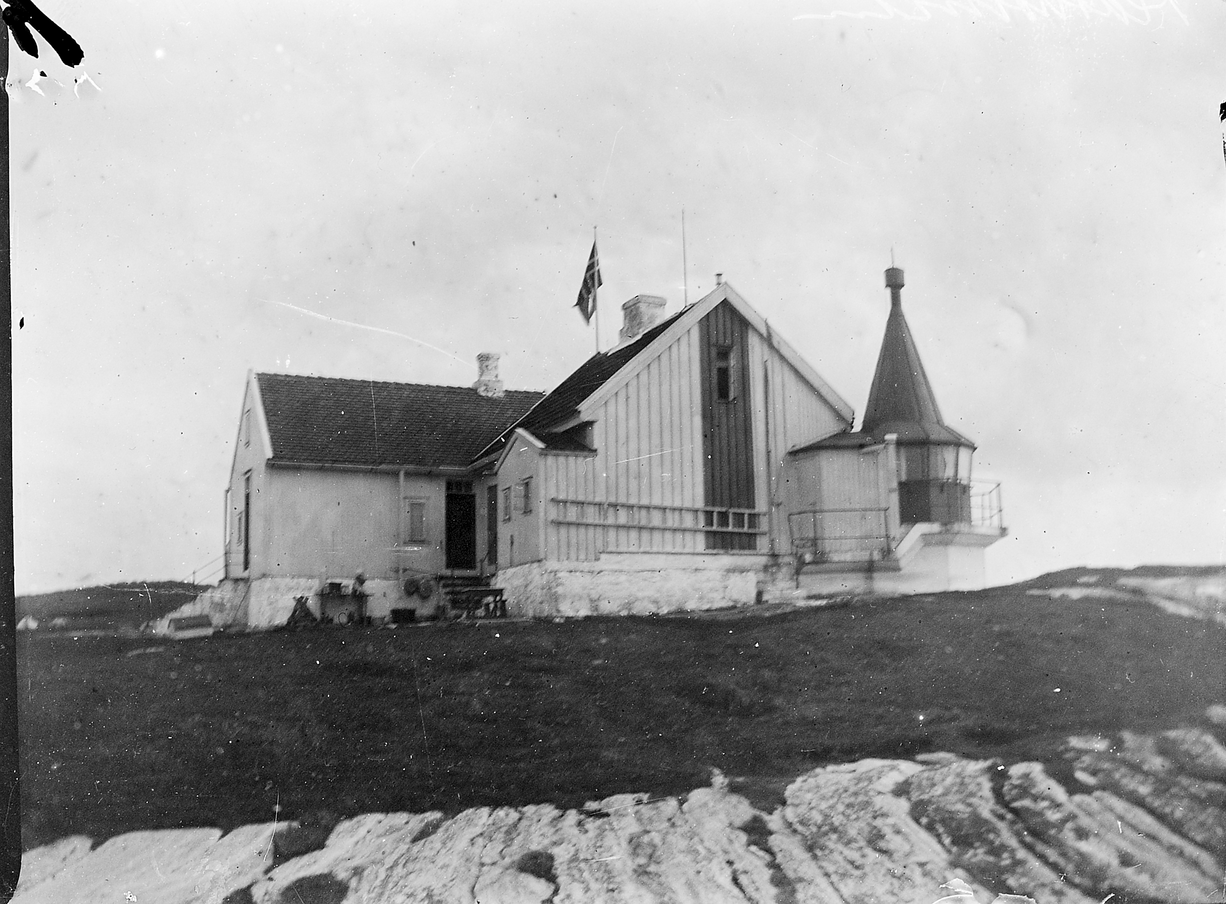 Bildet er hentet fra Arkivverket. Flatholmen, Sola Arkivinstitusjon : Riksarkivet Arkivnavn : Fyrdirektoratet Sted : Norge, , , Emneord: Fyr, Kyst Avbildet